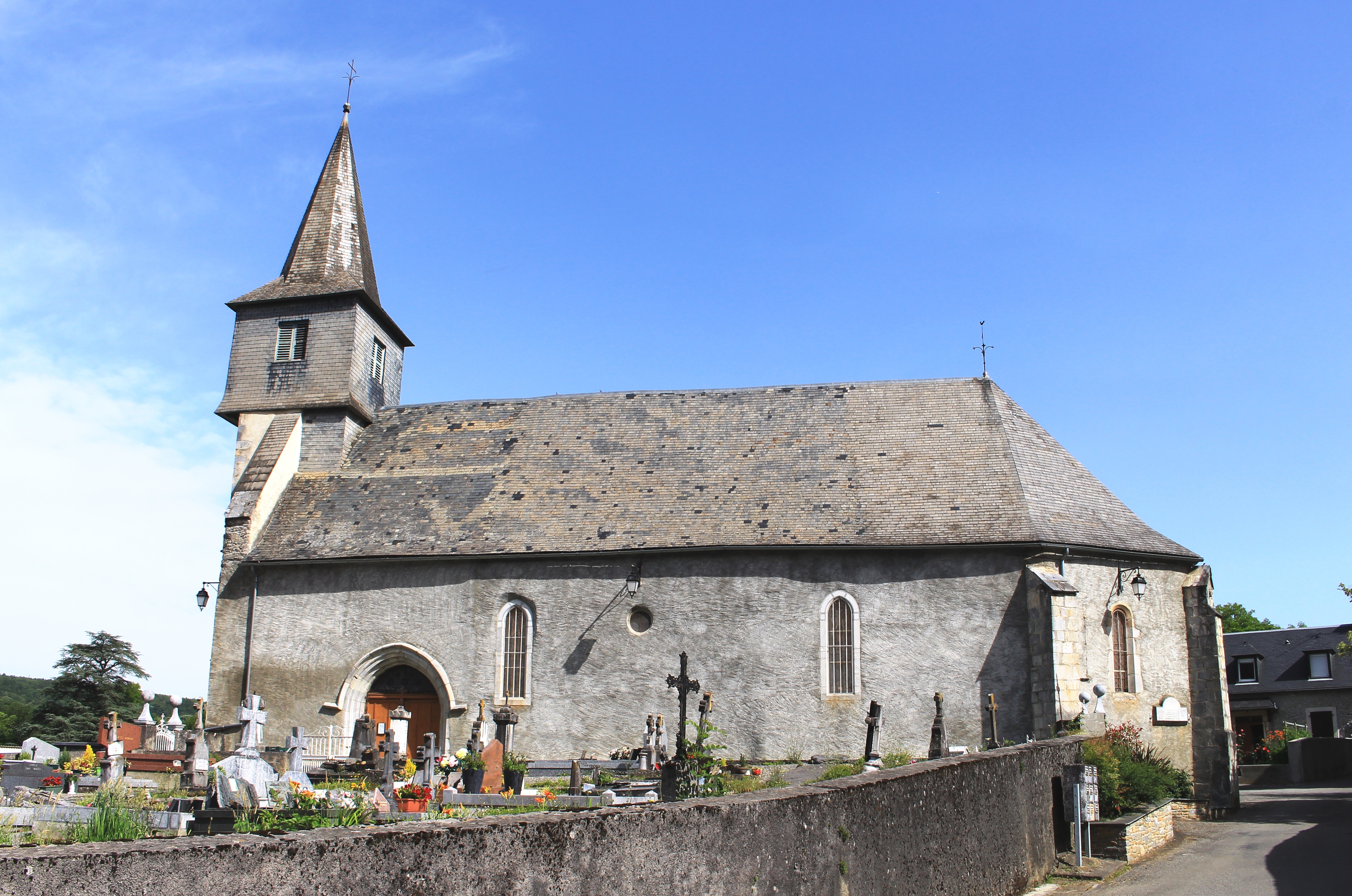 Église Saint-Blaise de Bazus-Neste (Hautes-Pyrénées)